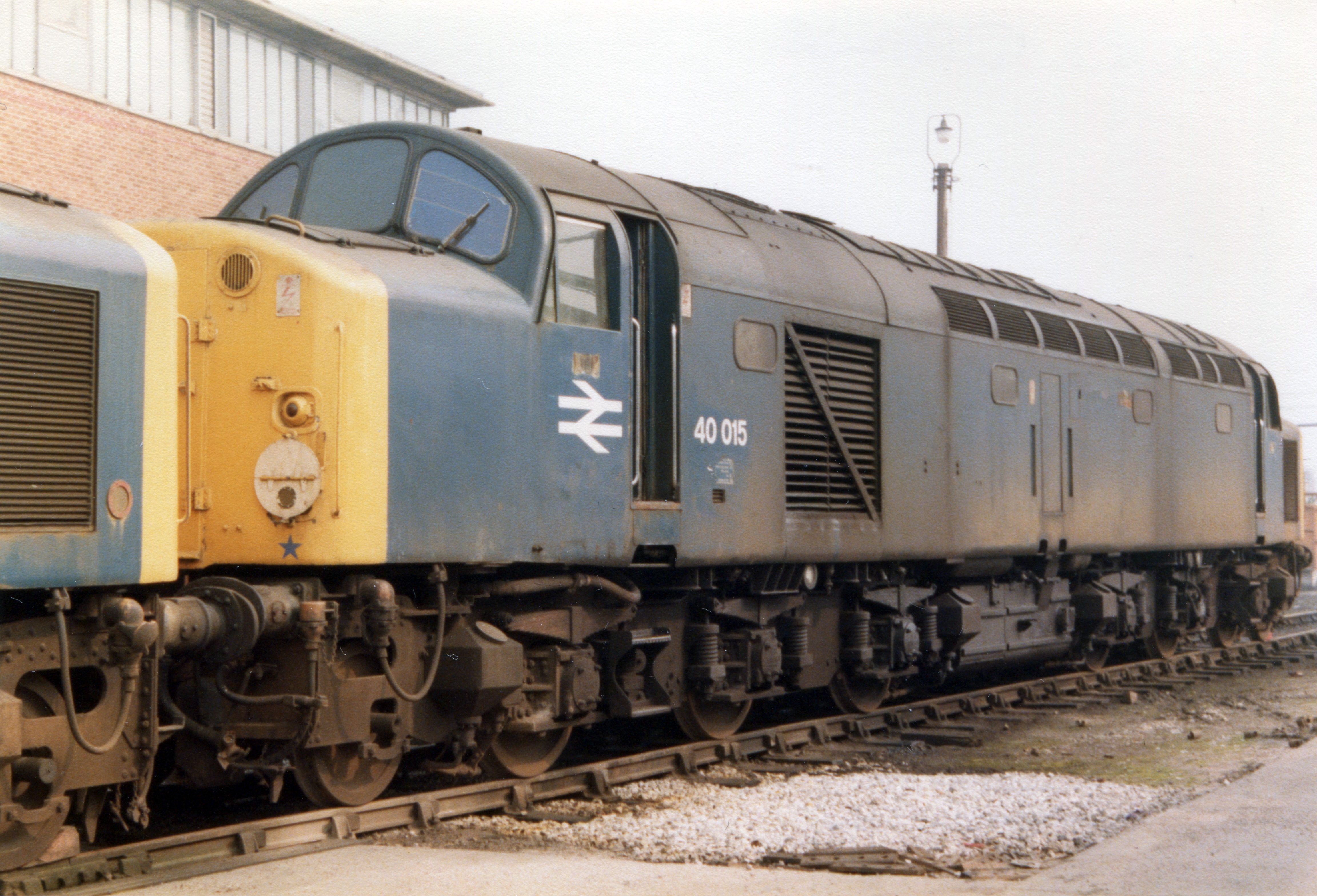 40015 - Crewe